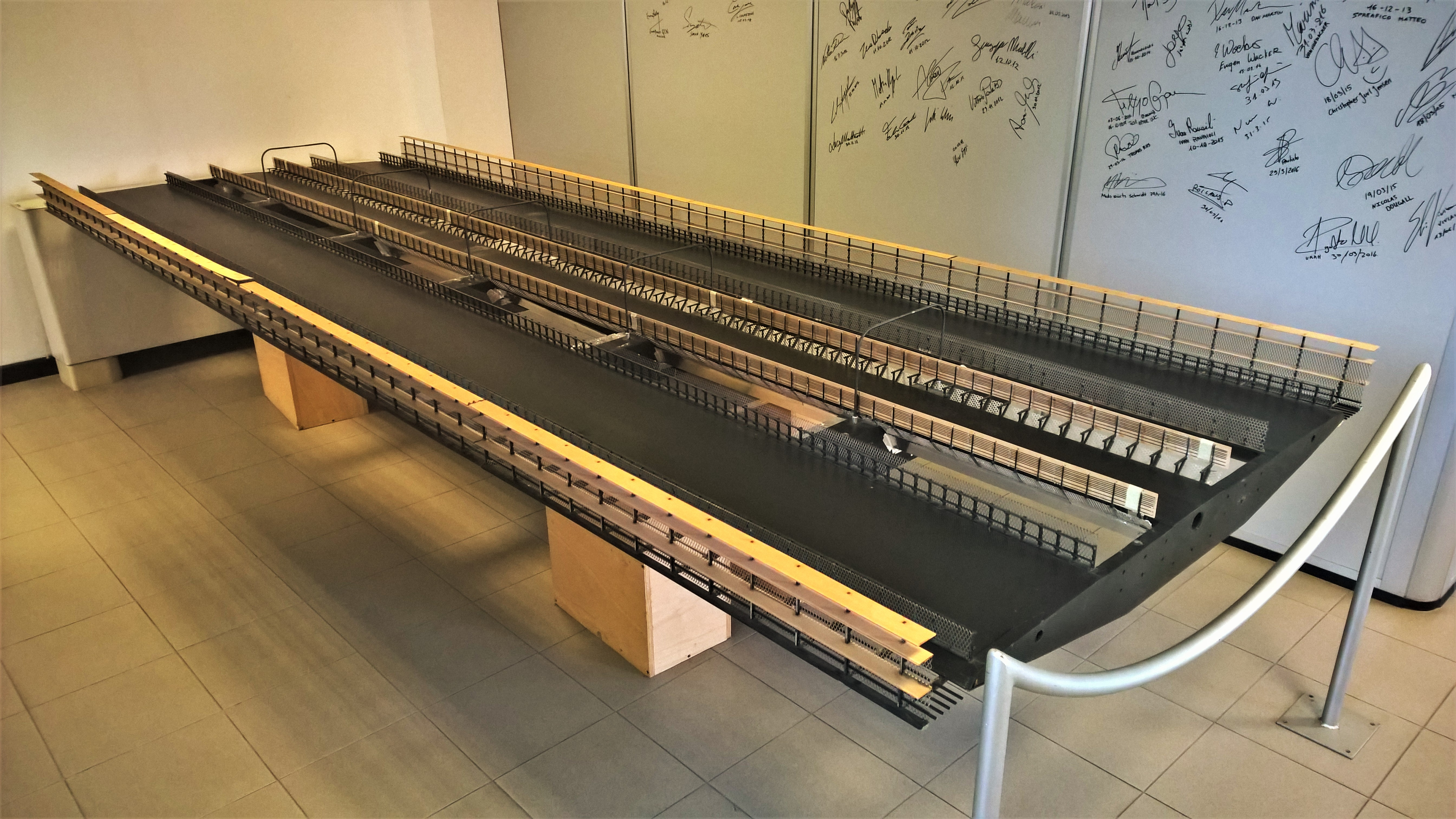 Modellino di un troncone del Ponte di Messina presso la Galleria del Vento del Politecnico di Milano.